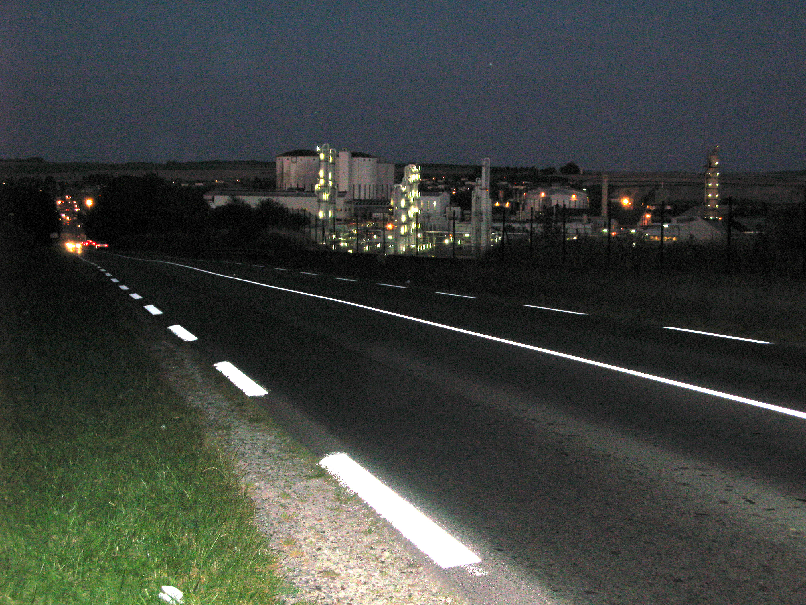 Origny-Sainte-Benoite (Aisne, France) - La route venant de Saint-Quentin descend pour traverser Origny et continuer vers Guise. On remarque l'importance des équipements industriels, à droite.